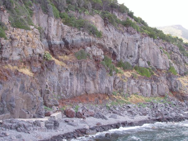 Fotografia fatta nel luglio 2004 da Francesco Mulas che la rilascia con licenza GFDL. Località S'abba durche, Cala Gonone - Dorgali (NU) - Italia. Colate laviche alternate a depositi piroclastici appartenenti al Quaternario. (Versione a bassa risoluzione)